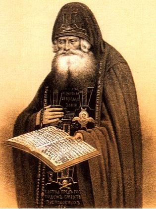 Преподобный Иоанн, затворник Святогорский, чудотворец.